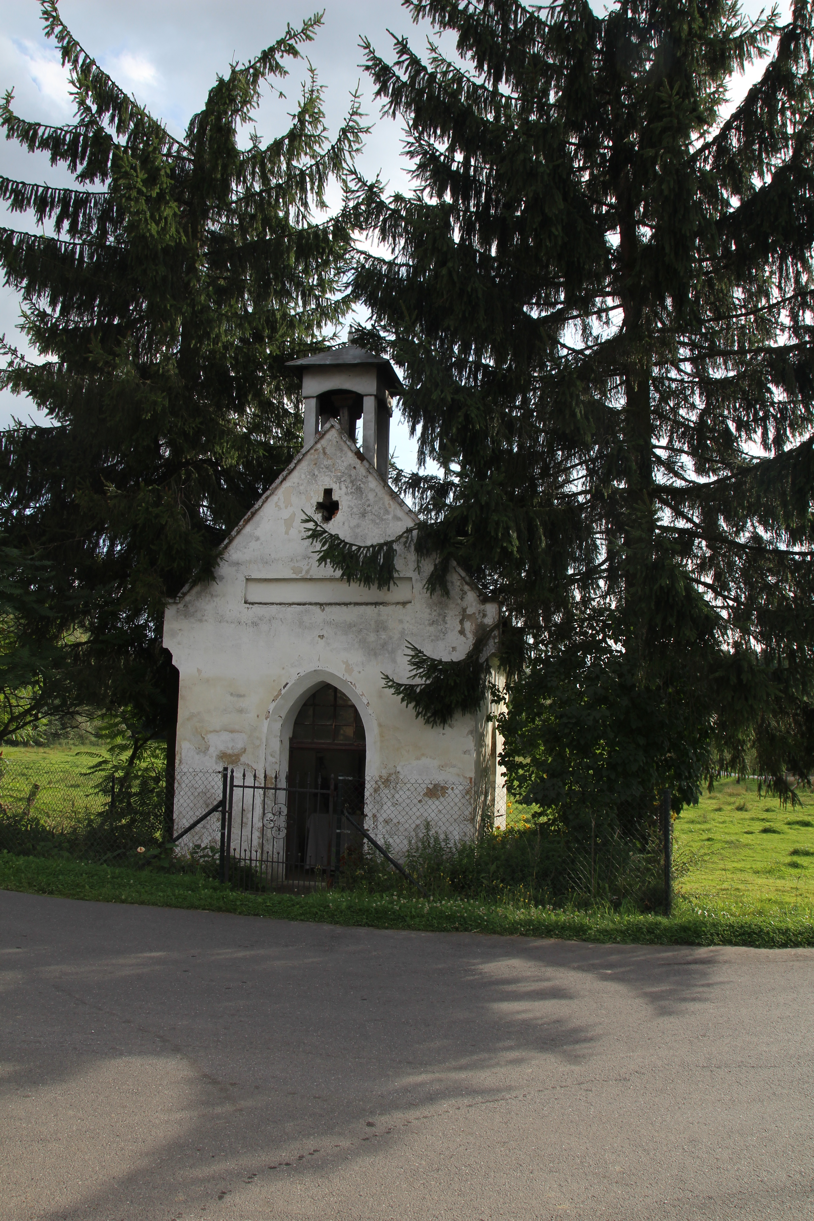 Słupice – wieś w Polsce położona w województwie opolskim, w powiecie nyskim, w gminie Pakosławice.